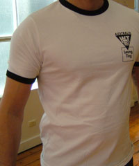 Taget før træning, en typisk tshirt med WingTsun logo på. Pethol 30. aug 2011, 21:44 (CEST)